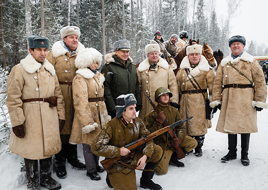 Министр обороны России генерал армии Сергей Шойгу на церемонии открытия историко-мемориального комплекса «Партизанская деревня» на территории Военно-патриотического парка культуры и отдыха Вооруженных Сил РФ «Патриот»